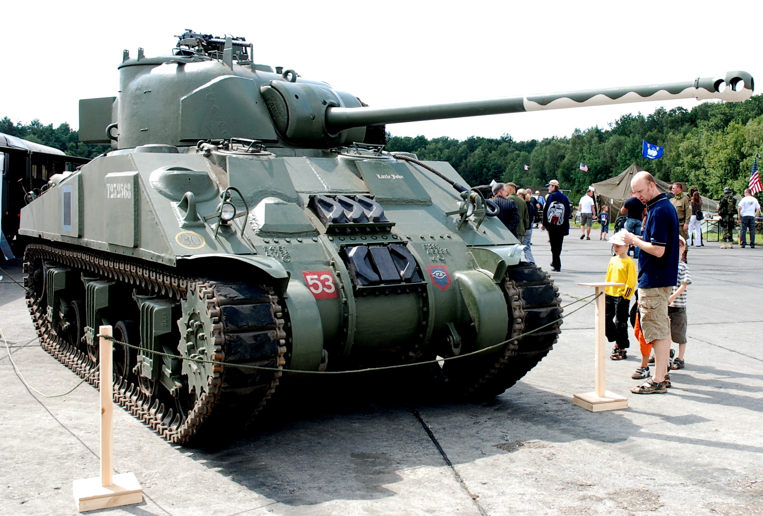 Sherman Firefly of the British Guards Armoured Division, een statische show op het vliegveld van Ursel, België